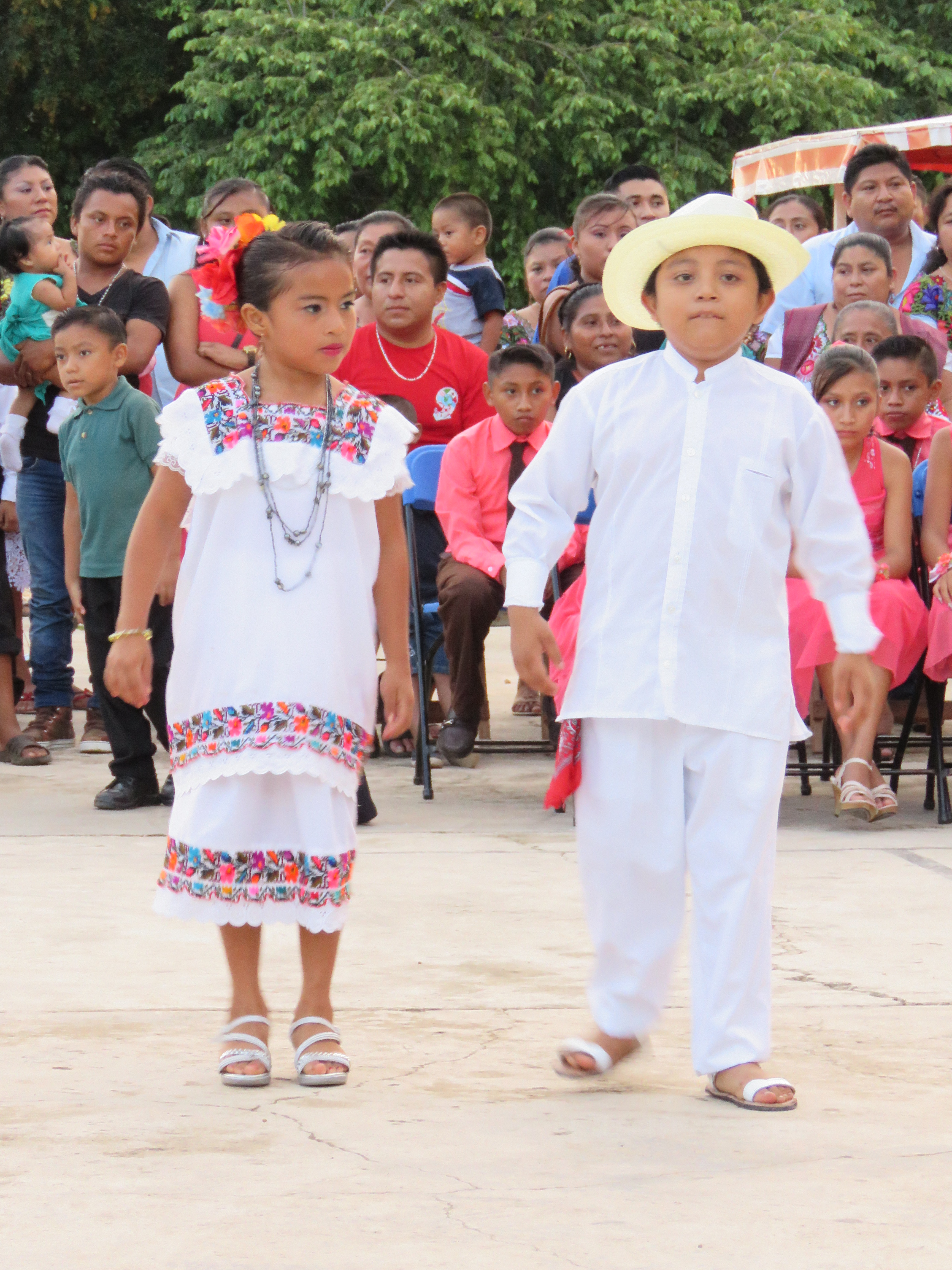 Esta imagen es un ejemplo del traje típico de las comunidades de Yucatán, en este caso, la imagen se obtuvo de un festival que se realizó en la comunidad de Popolá.